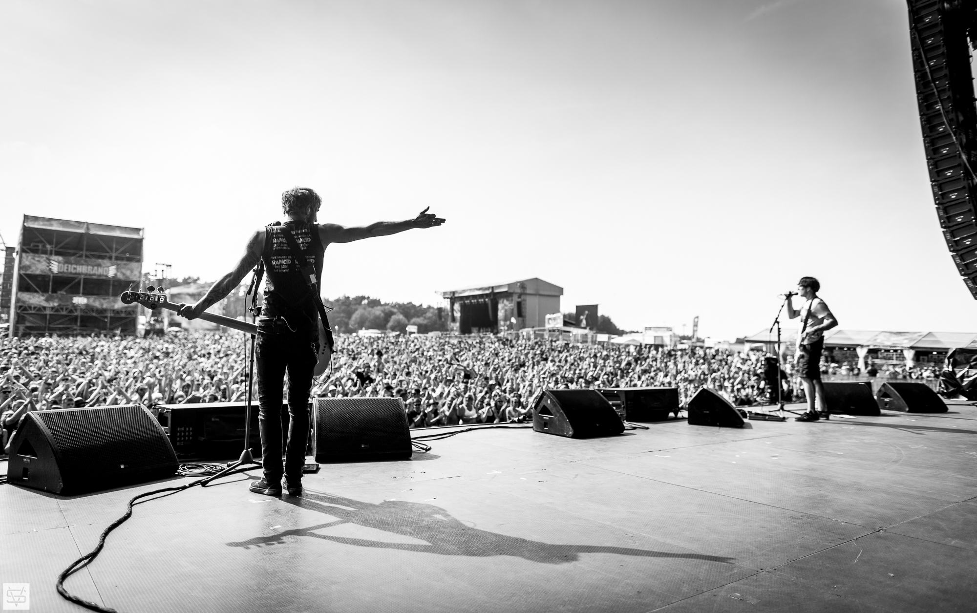 Itchy Poopzkid beim Deichbrand Festival 2015